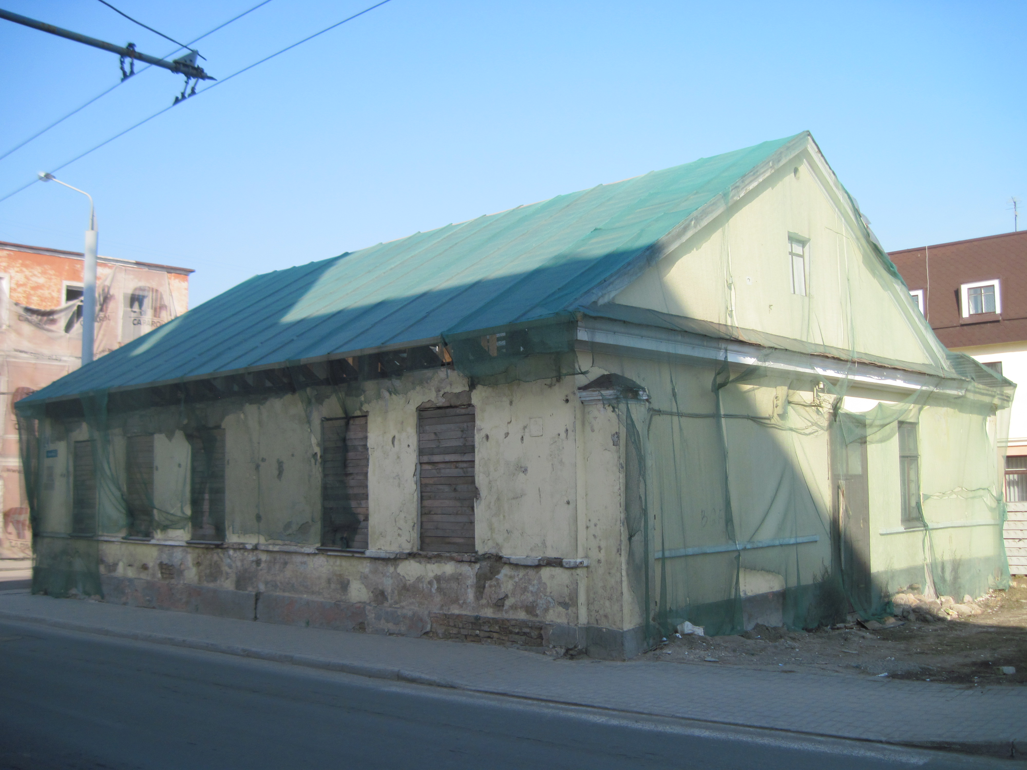 Забудова гістарычнага цэнтра Гродна. Вуліца К. Маркса, 24